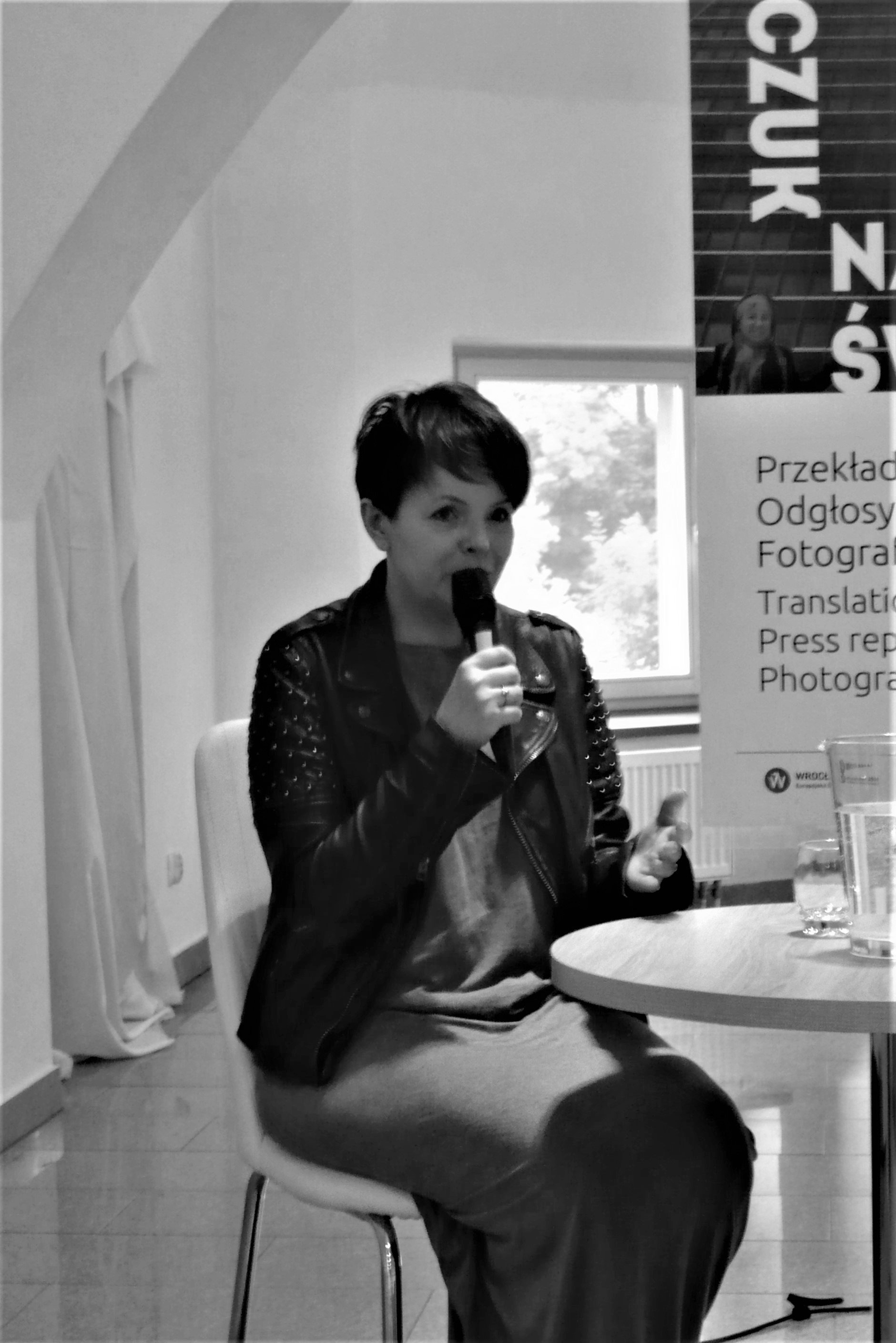 Karolina Korwin Piotrowska